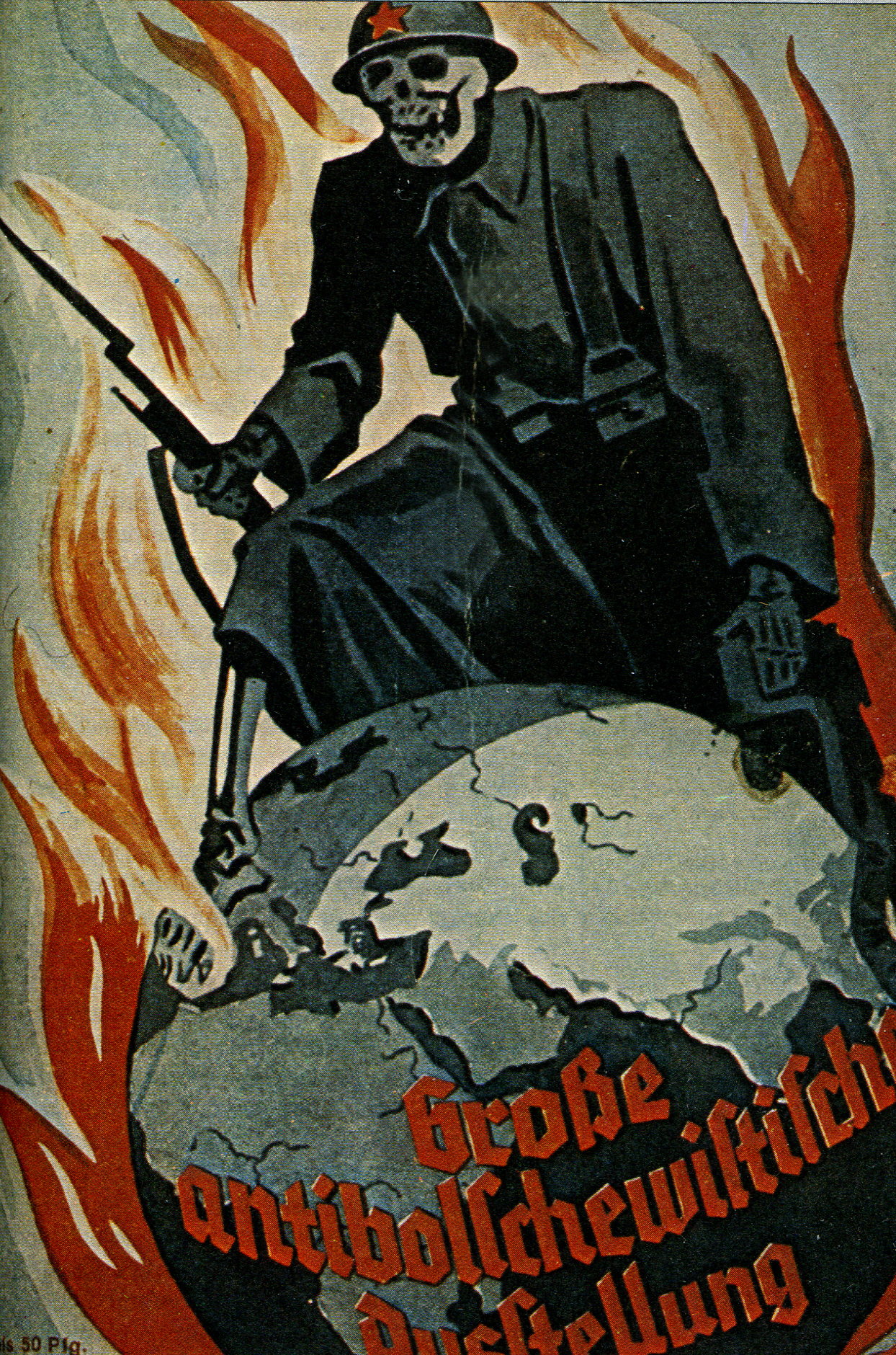 Обложка буклета выставки "GROSSE ANTIBOLSCHEWISTISCHE AUSSTELLUNG", 1937, Германия, Бавария, Нюрнберг. Подготовлен Министерством Пропаганды